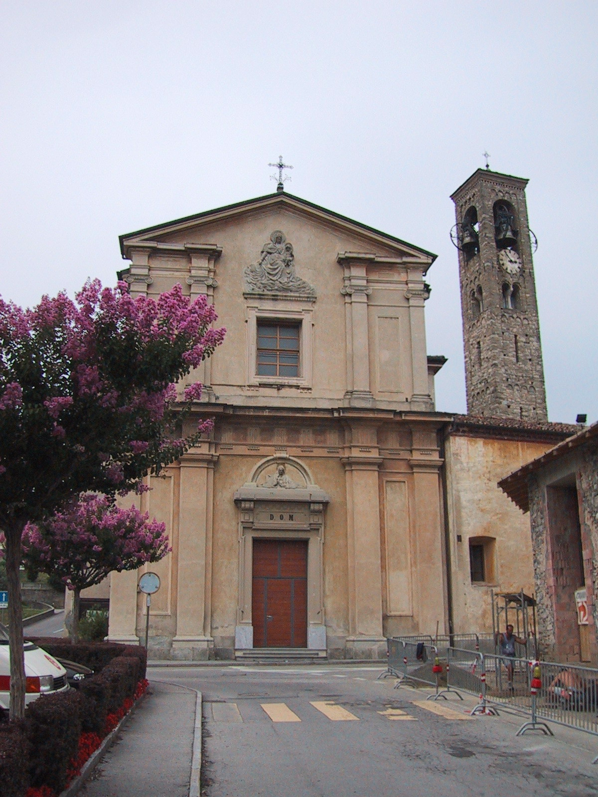 Chiesa parrocchiale dei Santi Quirico e Giulitta a Novazzano